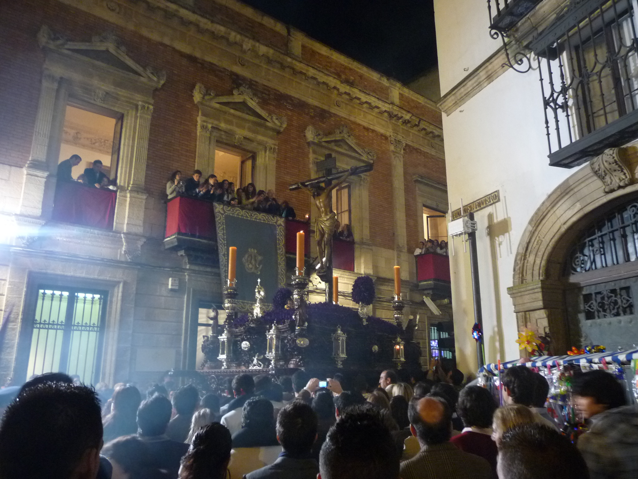 Semana Santa 2010 en Jerez de la Frontera (Andalucía, España)